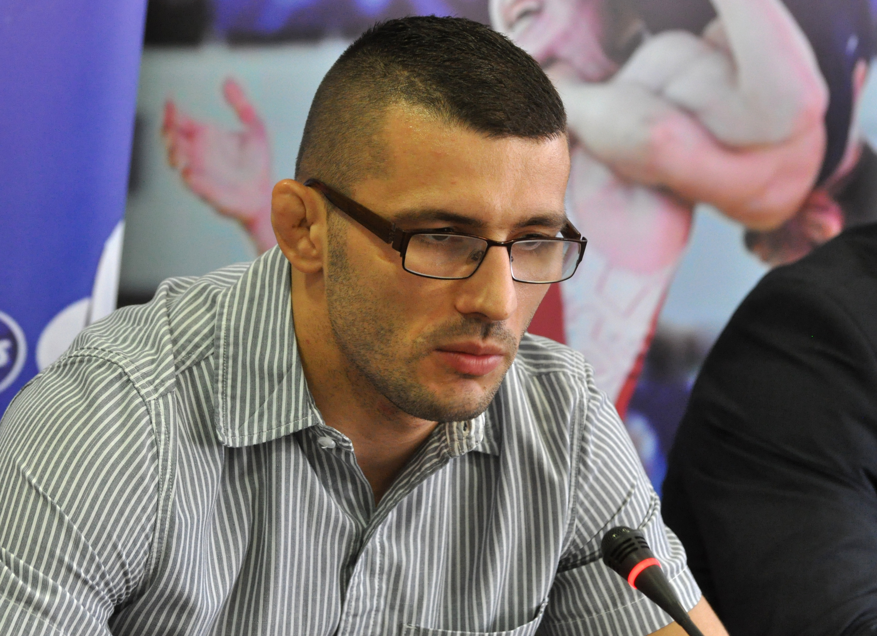 Davor Štefanek